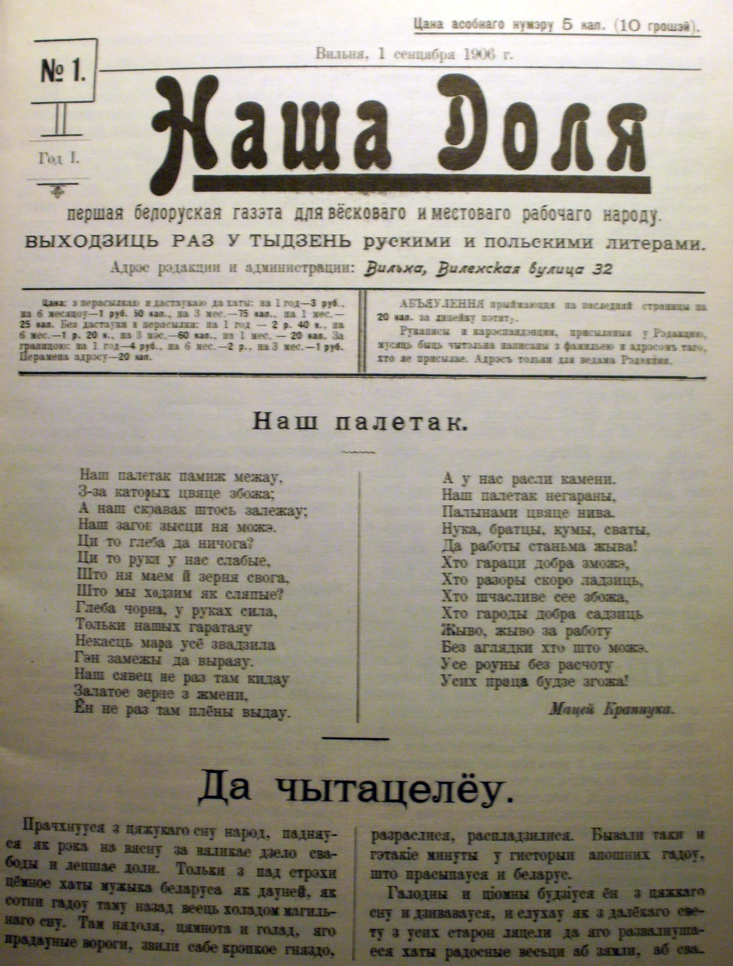 Беларуская (тарашкевіца): Наша доля #1, 1906